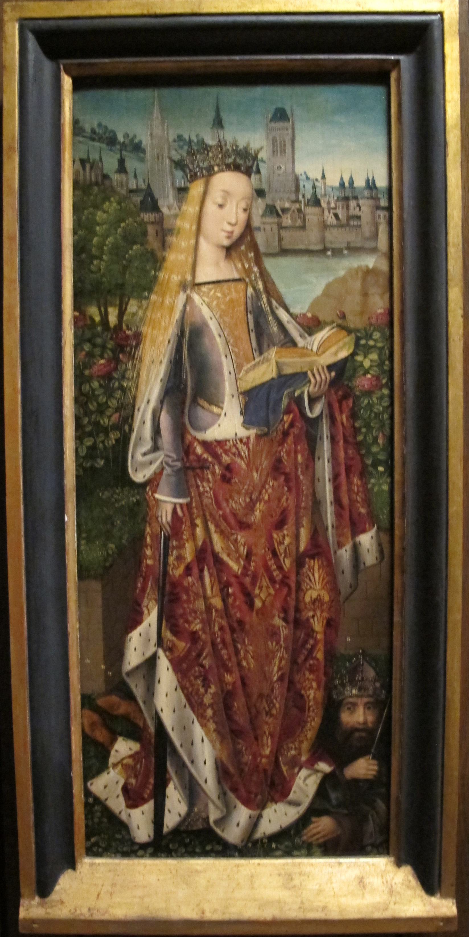 Philadelphia Museum of Art